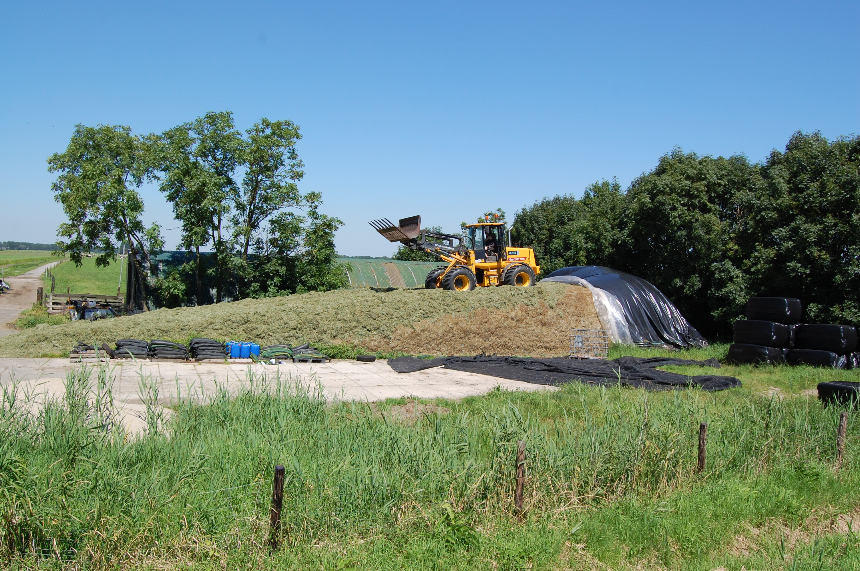 De aanleg van Kuilgras, bij melkveebedrijf familie Broekhuijsen te Wilnis